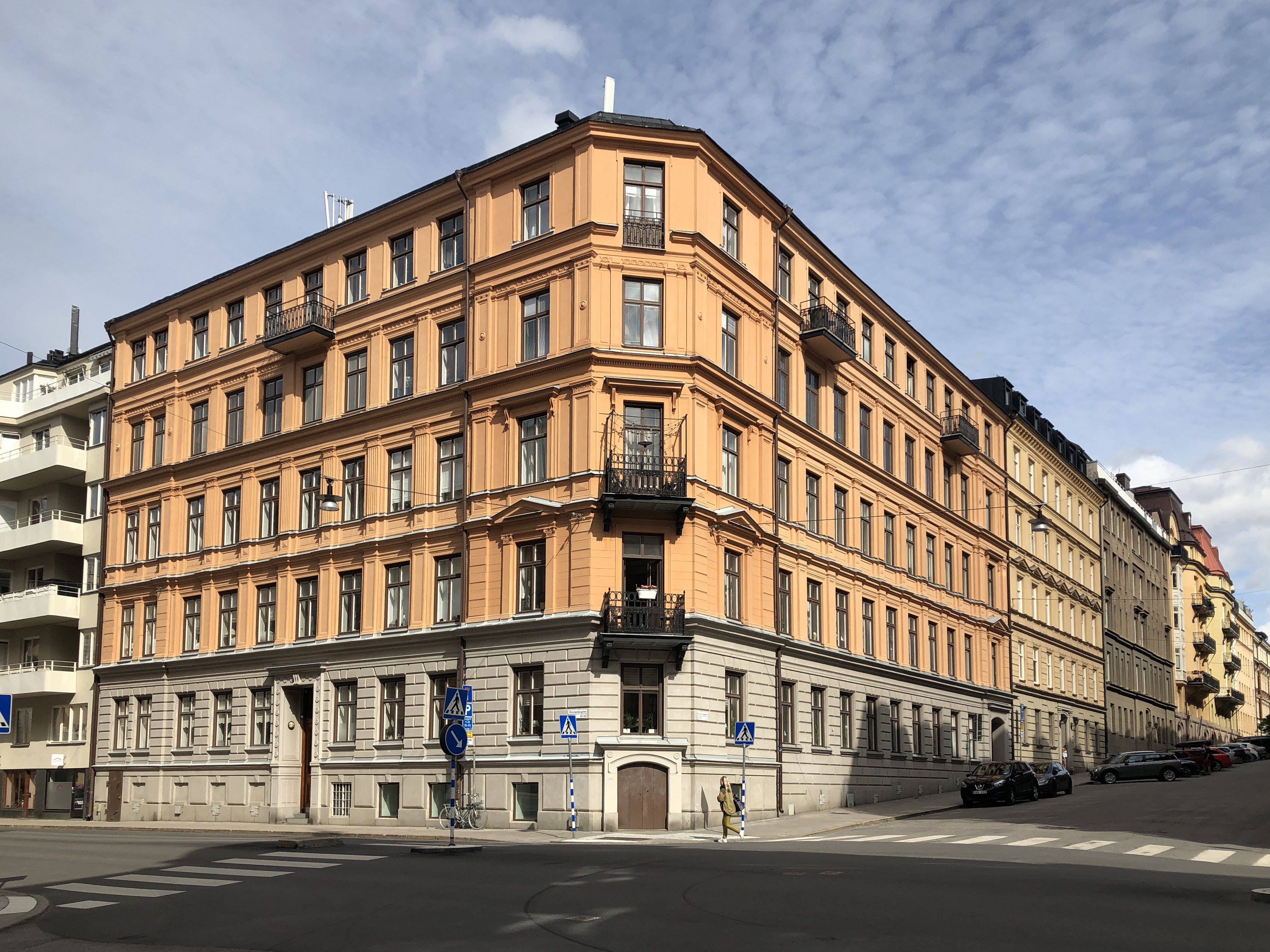 Renen 17, Grev Turegatan 67, Östermalmsgatan 63 Stockholm. Nybyggnadsår 1880 - 1880 Anders Gustaf Forsberg (Arkitekt) H. Larsson (Byggmästare) H. Larsson (Byggherre)